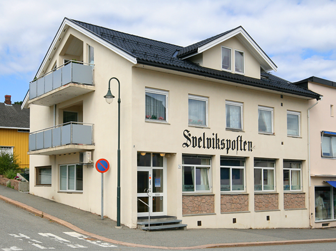 Svelviksposten, Svelvik, Norway.